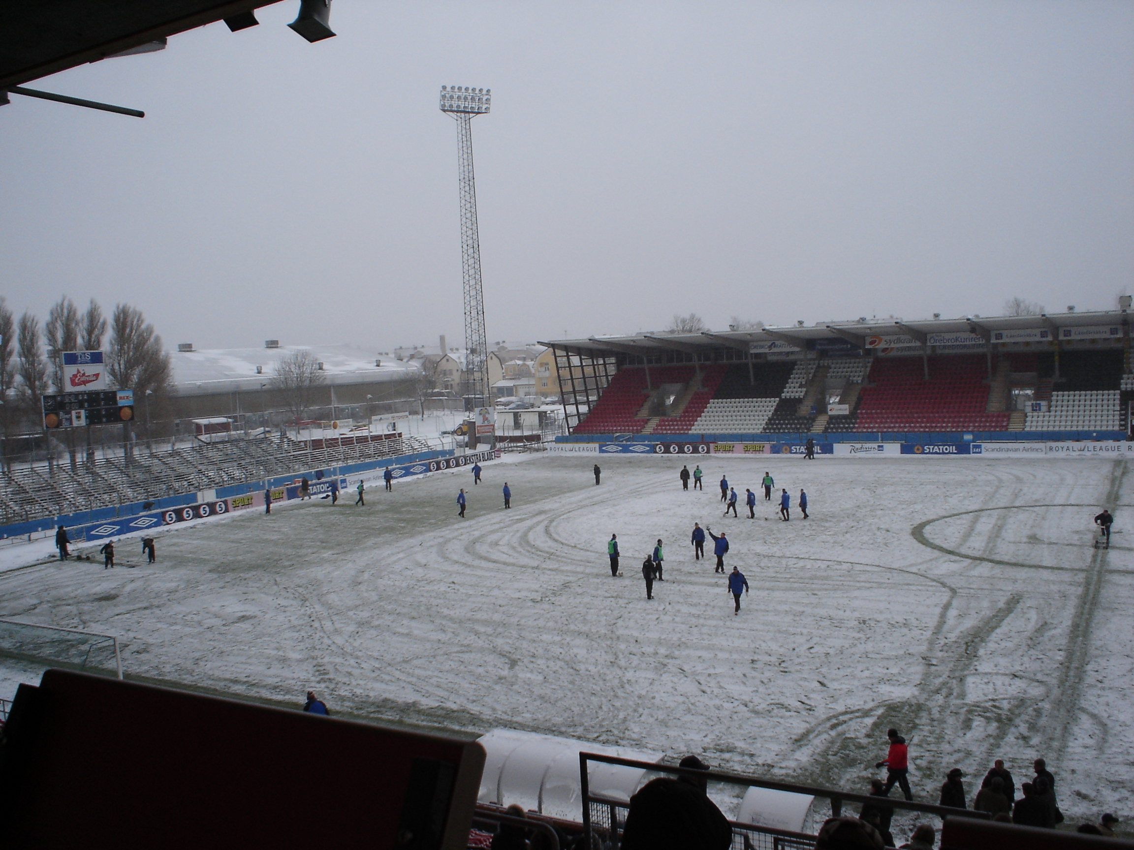 Behrn arena, en snöig februaridag 2005.